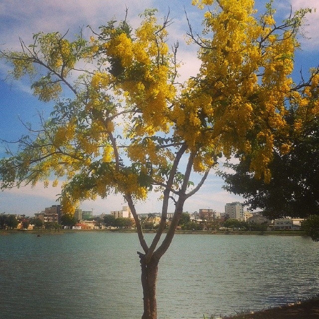 Vista a partir de uma das margens da Lagoa Grande, em Patos de Minas